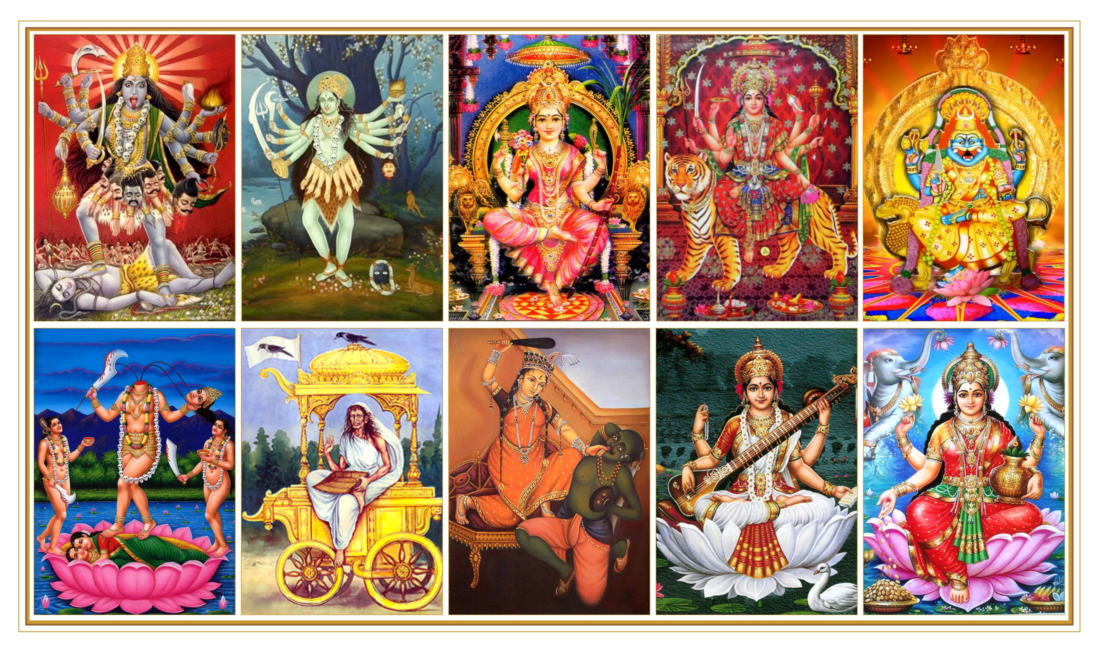 Mahavidya